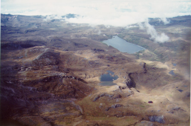 Laguna de Otún - Risaralda - Colombia - Vista aerea de la laguna de Otún que da origen al río del mismo nombre. Estudio del impacto ambiental del alcantarillado en la ciudad Director del estudio: Alfredo Bianco Geymet Financiamiento BID 1998